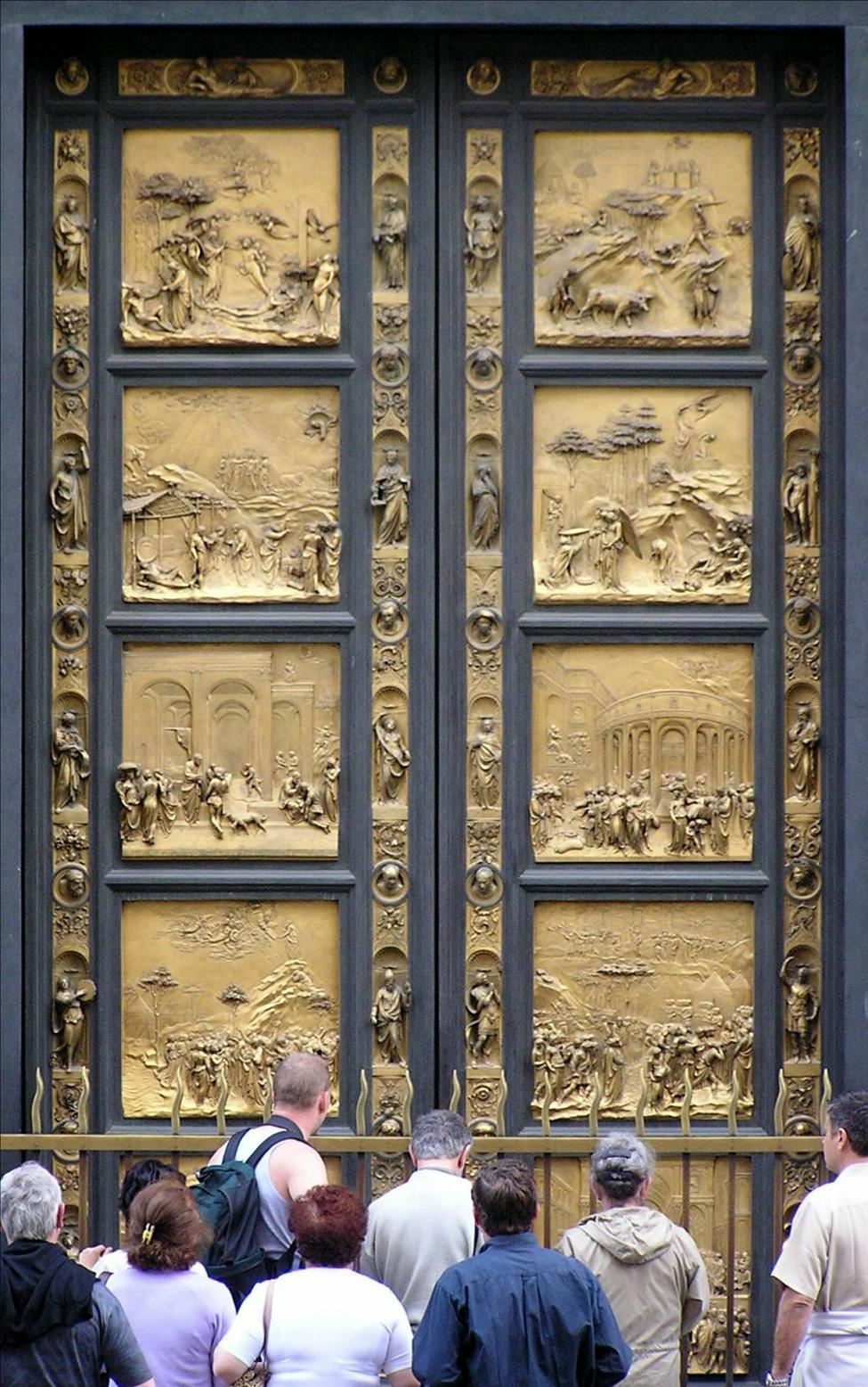 Gates (Porta del Paradiso), Battistero di San Giovanni (Florence), by Lorenzo Ghiberti.